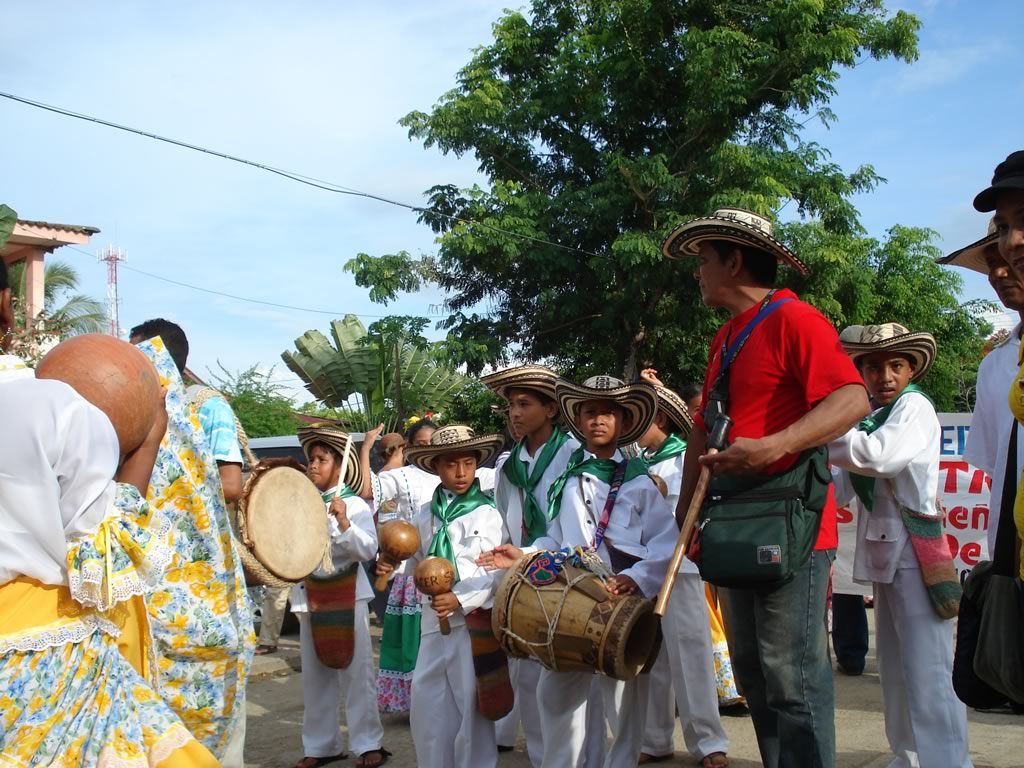 Niños Gaiteros en el Festival del Porro en Cordoba, Colombia.